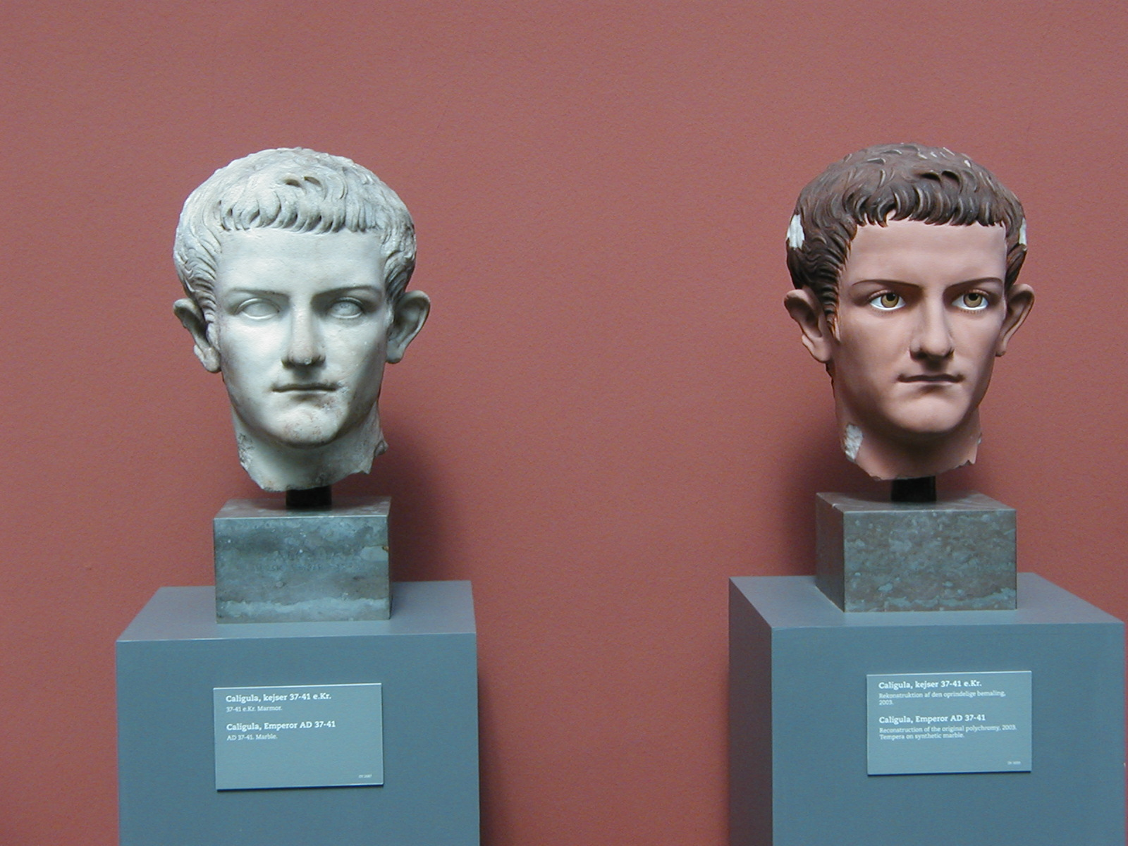 Marmorbüste des Caligula mit Farbresten; daneben Rekonstruktion der Polychromie an einer Gipsreplik, Ny Carlsberg Glyptotek, Kopenhagen